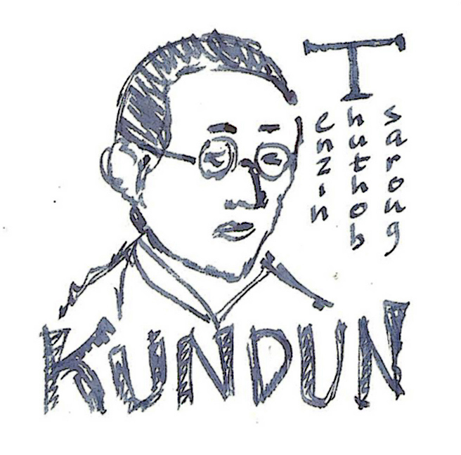 autore: kneescomes (opera propria)